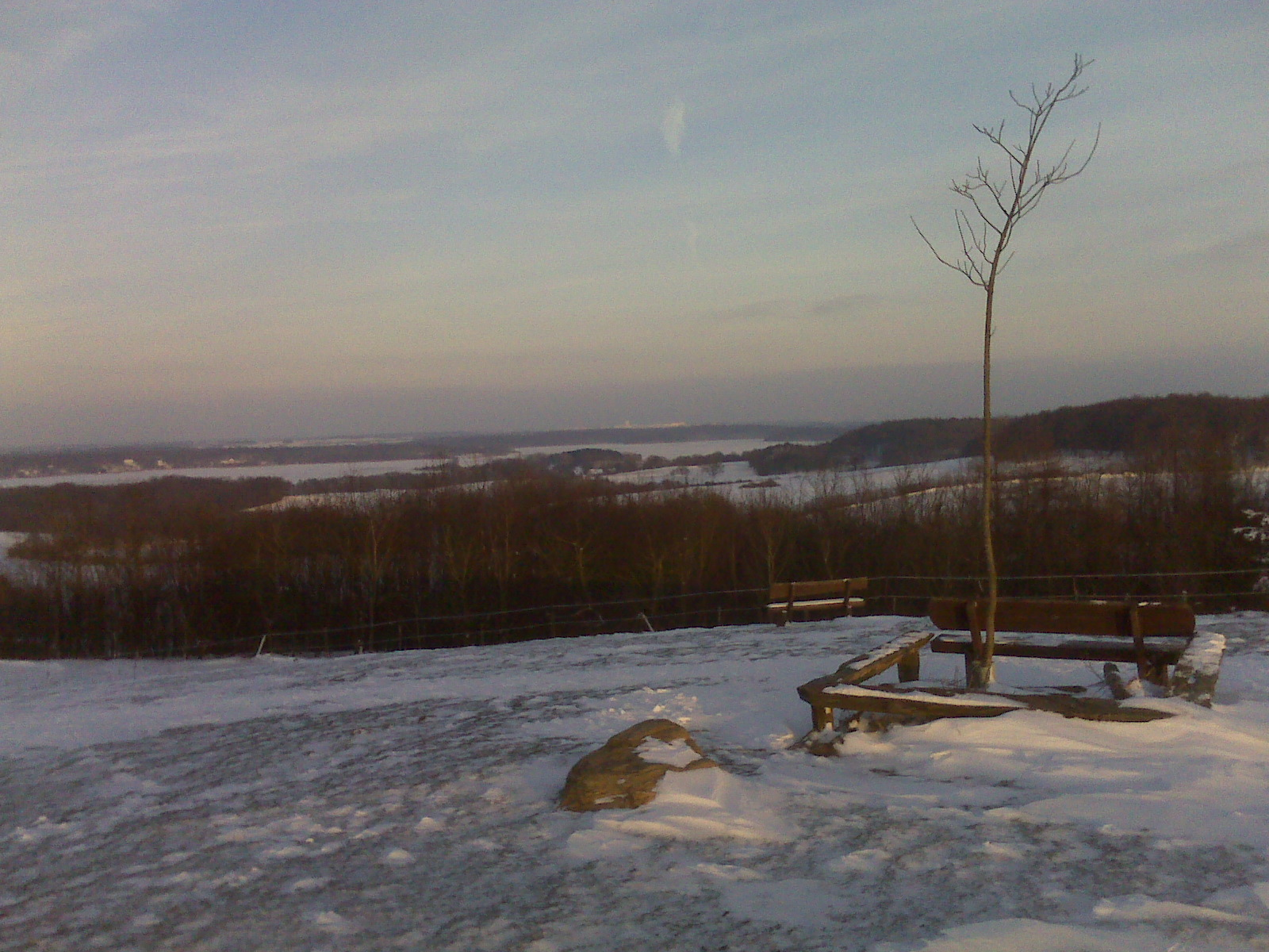 Winterlicher Blick vom Tüteberg Richtung Nordosten. In der Mitte sind am Horizont die Hochhäuser in Kiel-Mettenhof zu erkennen.